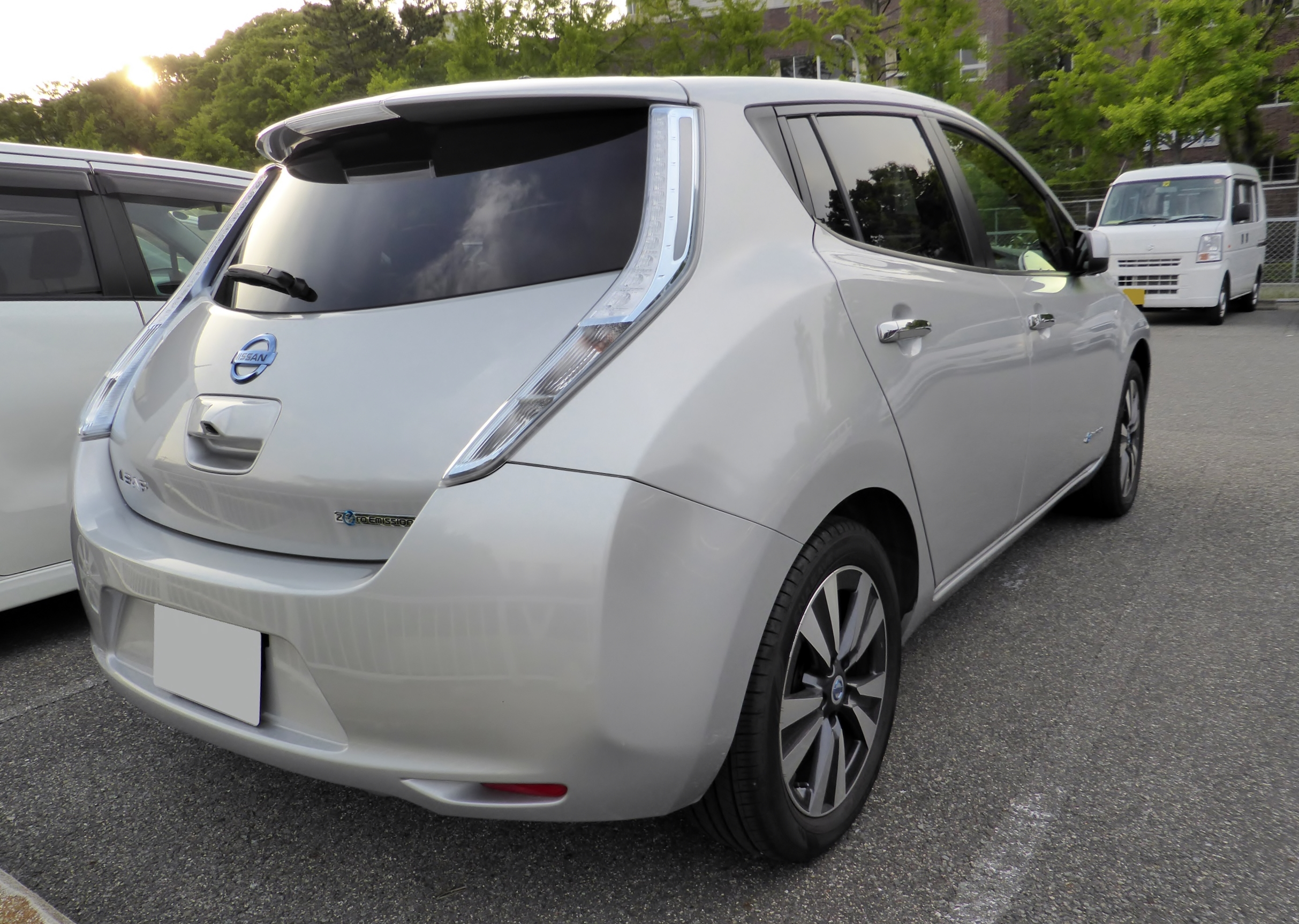 ZE0後期型日産・リーフをリアから撮影。